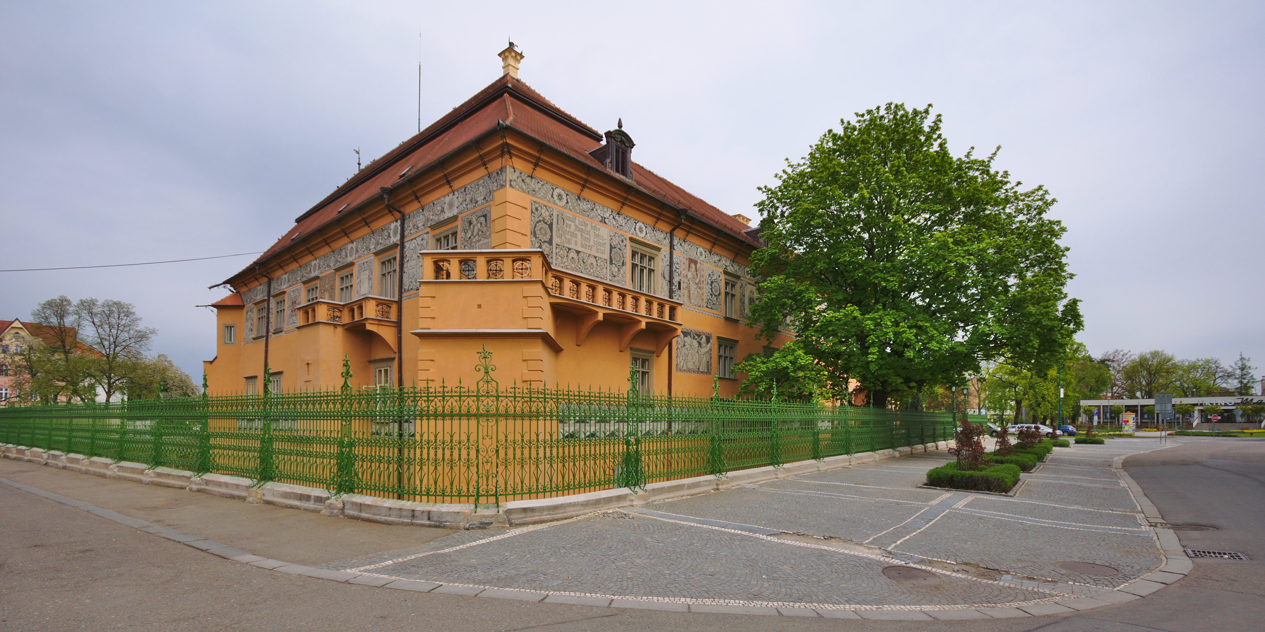 Prostějovský zámek